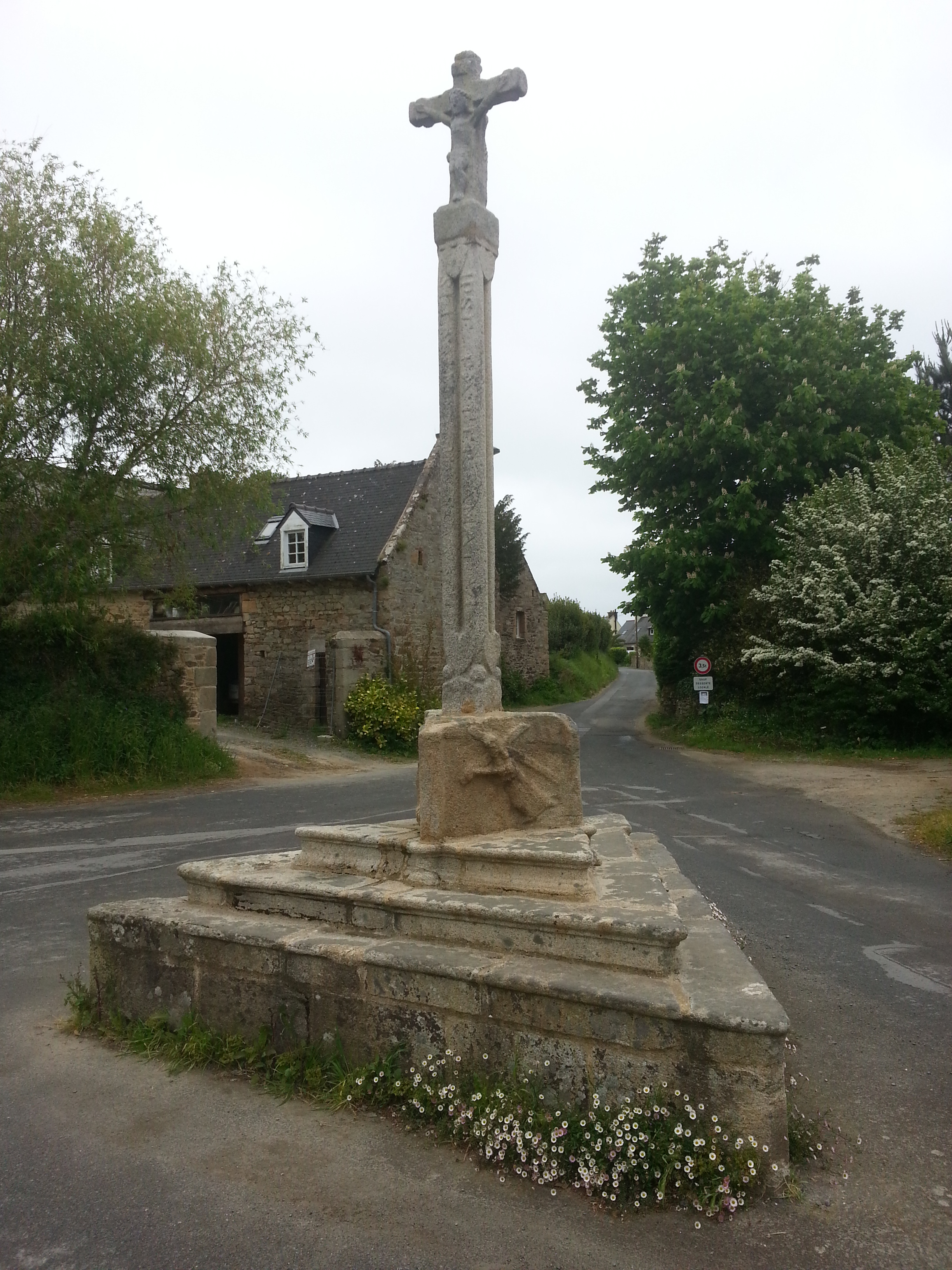 Commune de Ploubazlanec, Côtes-d'Armor, Bretagne. Le calvaire Cornic, au croisement (en 'T') du chemin de Traou C'hoad (celui qui débouche sur la gauche) arrivant dans la rue de Kerroc'h, cette dernière partant en face vers Toull Broc'h (au nord) et sur la droite vers Kerroc'h (au sud).